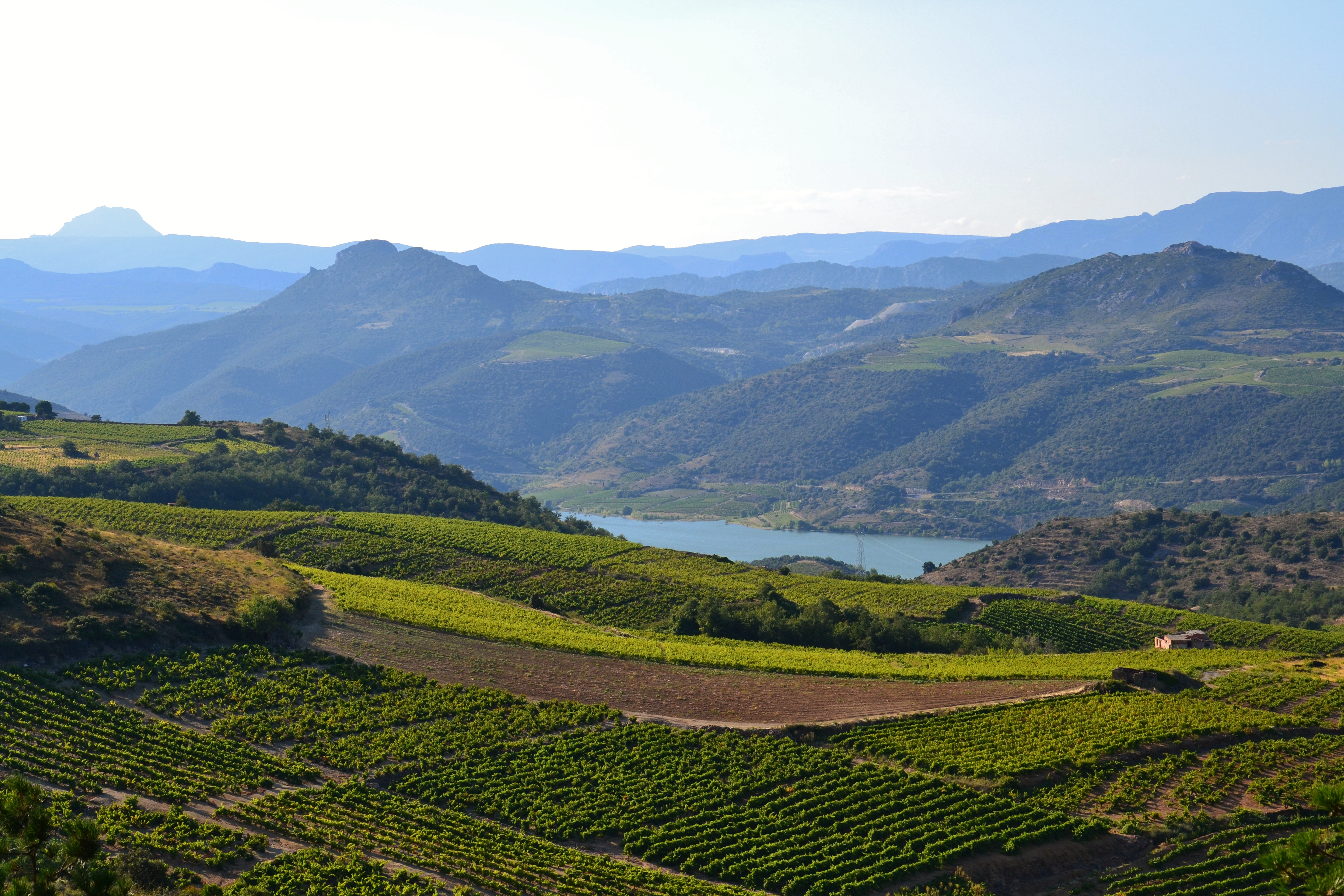 Vue sur le vignoble de Caramany (appellation AOC Côtes du Roussillon Villages), dans les Pyrénées-Orientales (France)